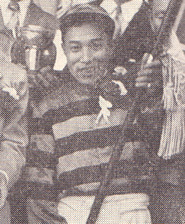 岩下密政騎手。